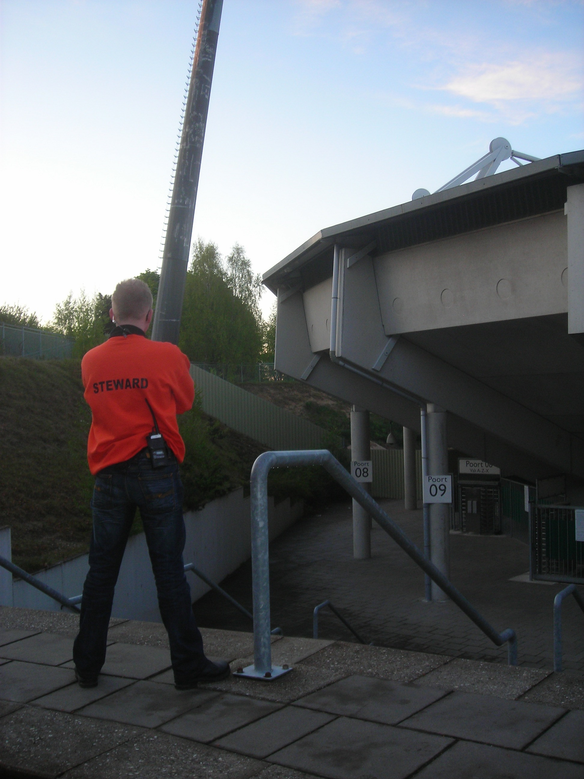 Zelfgemaakte foto